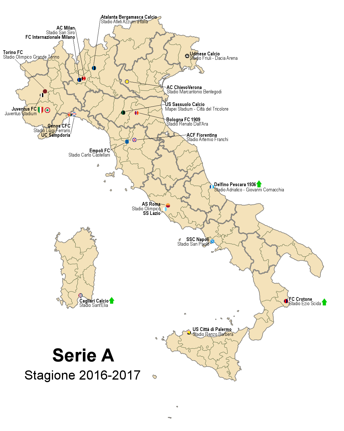 Ubicazione delle squadre della Serie A 2016-17